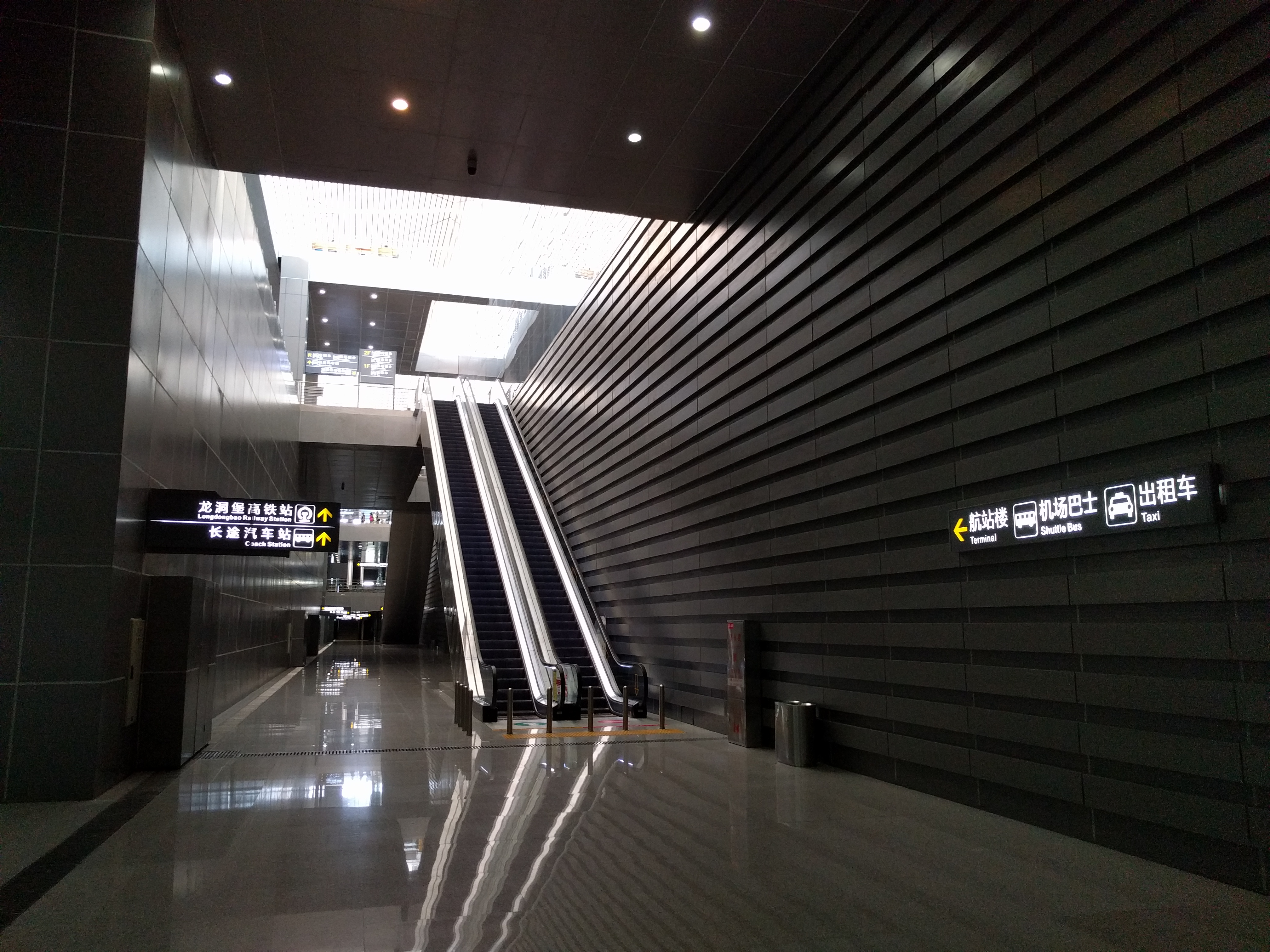 贵阳龙洞堡交通枢纽